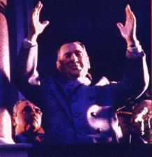 Es una foto (a color!!!) del general Juan Domingo Perón saliendo al palco mirando hacia la Plaza de Mayo.